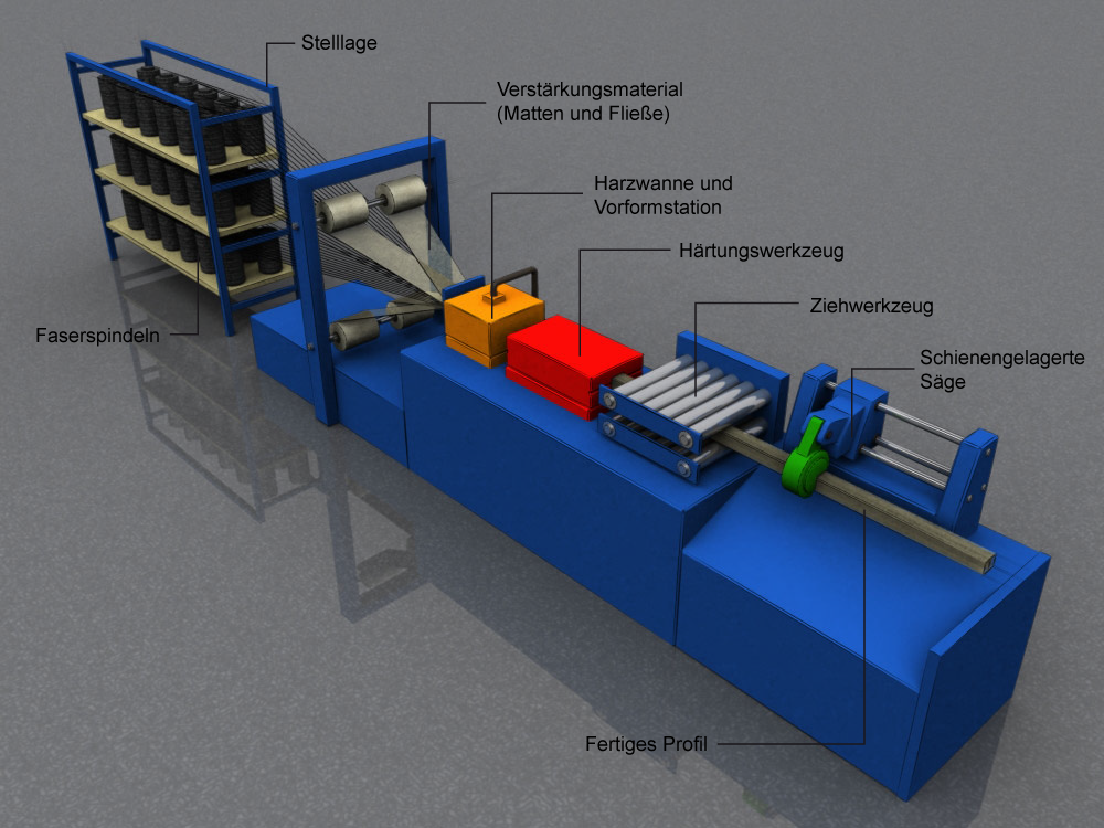 Beschreibung: Veranschaulichung Strangziehverfahren Zeichner: S. Demierre Datum: 17.11.2005